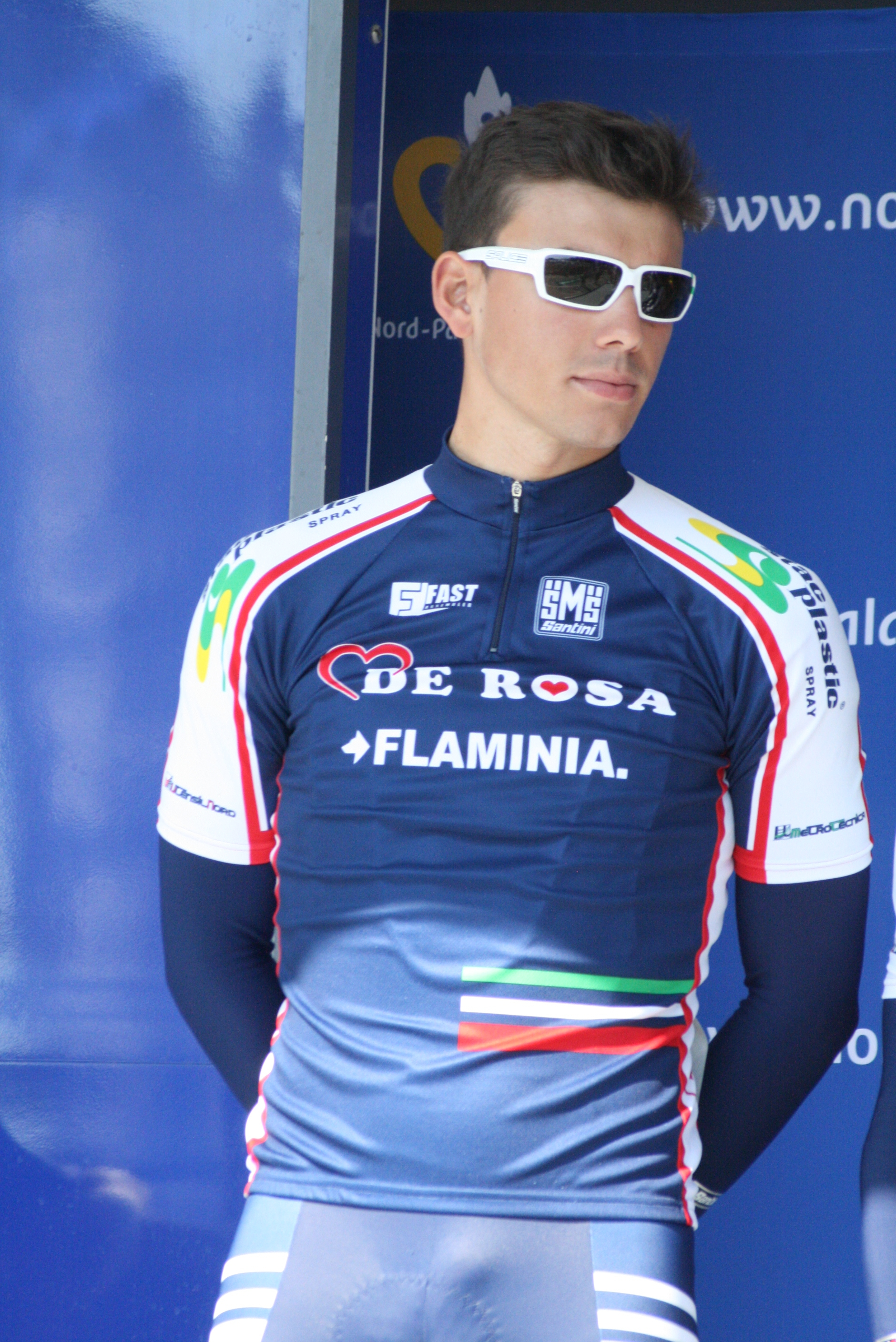 Présentation des coureurs au départ de la première étape Giorgio Brambilla